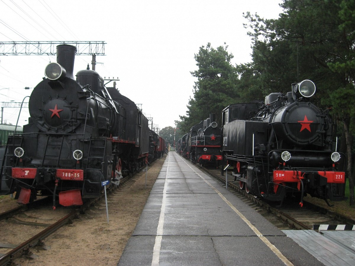 Баранавічы. Паравозы